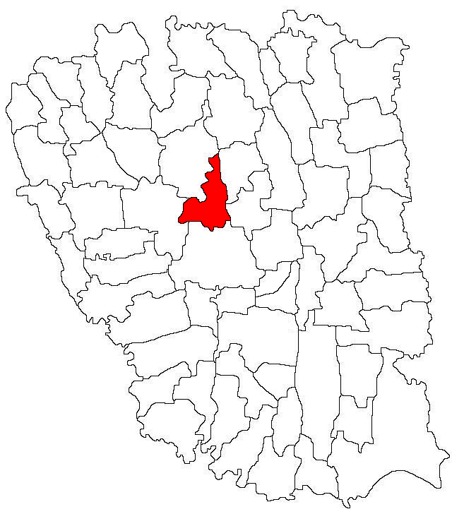 Categorie:Hărţi ale judeţului Galaţi